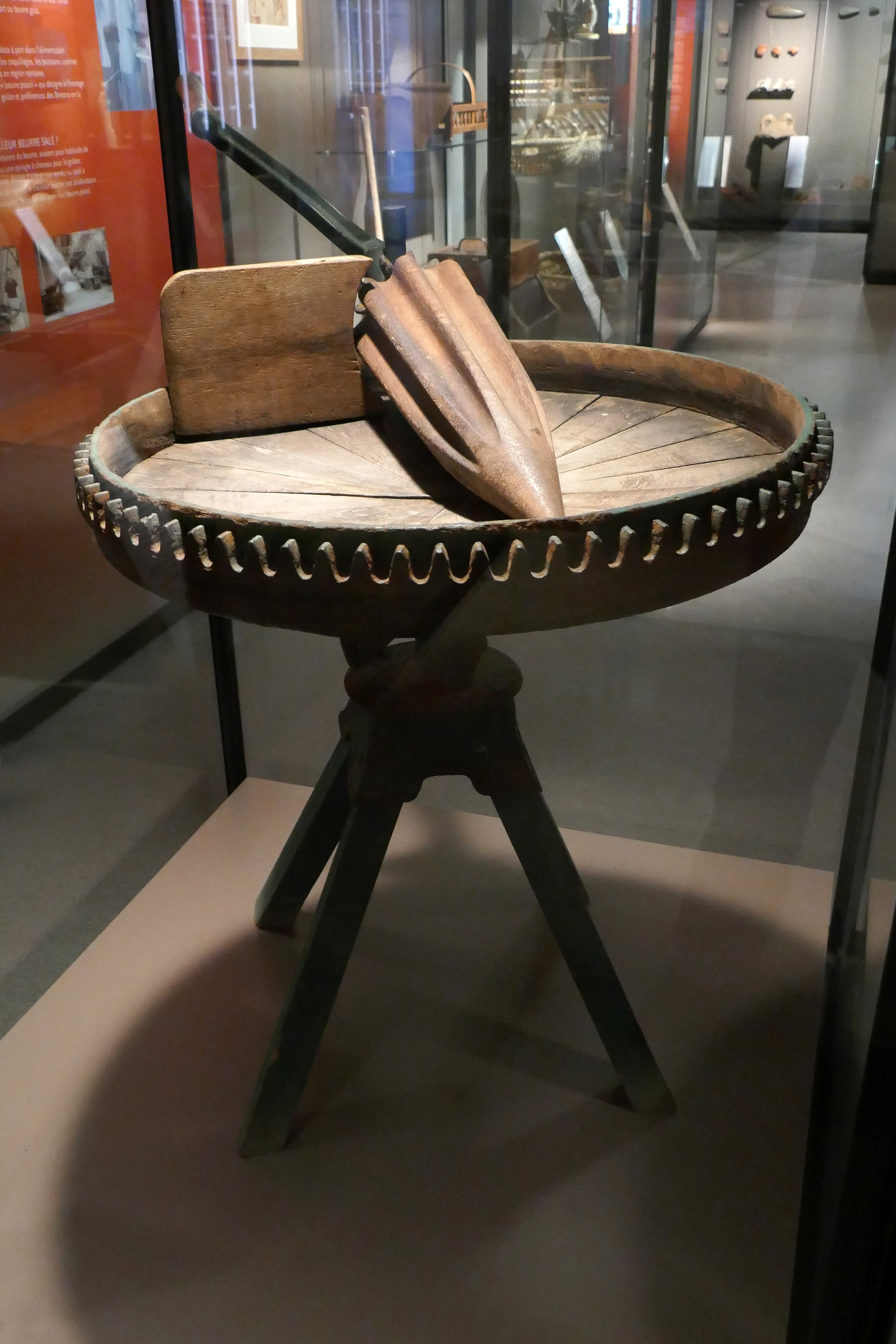 Malaxeur à beurre salé. Bretagne. Bois et métal. Début du 20e siècle. Musée des marais salants à Batz-sur-Mer (Loire-Atlantique). Dépôt du musée de Saint-Dégan (Morbihan).